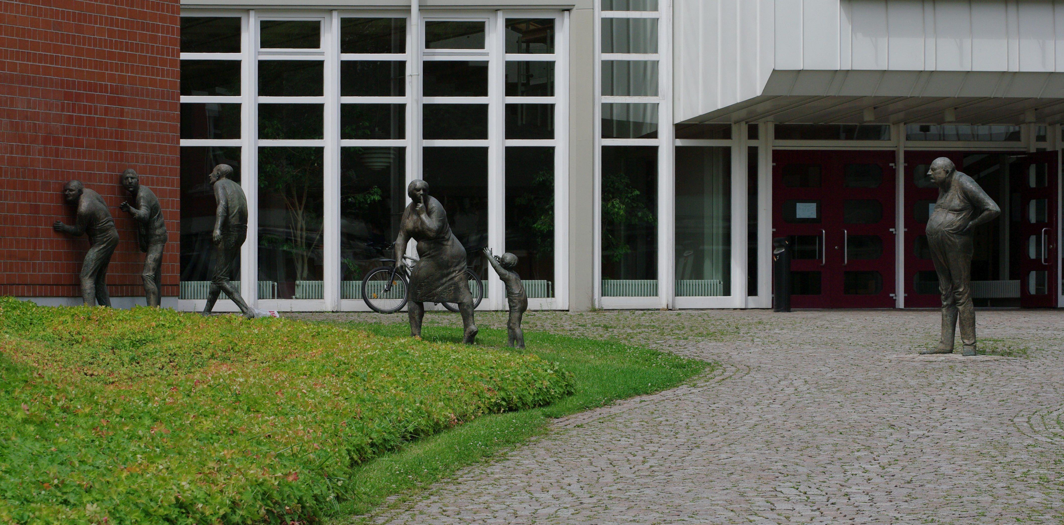 Kunst am Bau im Eingangsbereich der Musikhochschule in Freiburg